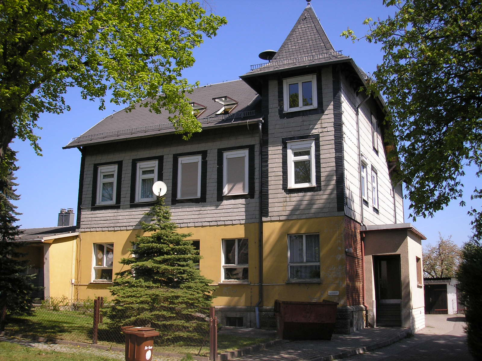 Ehemaliges Schulgebäude von Oberpörlitz (Thüringen).